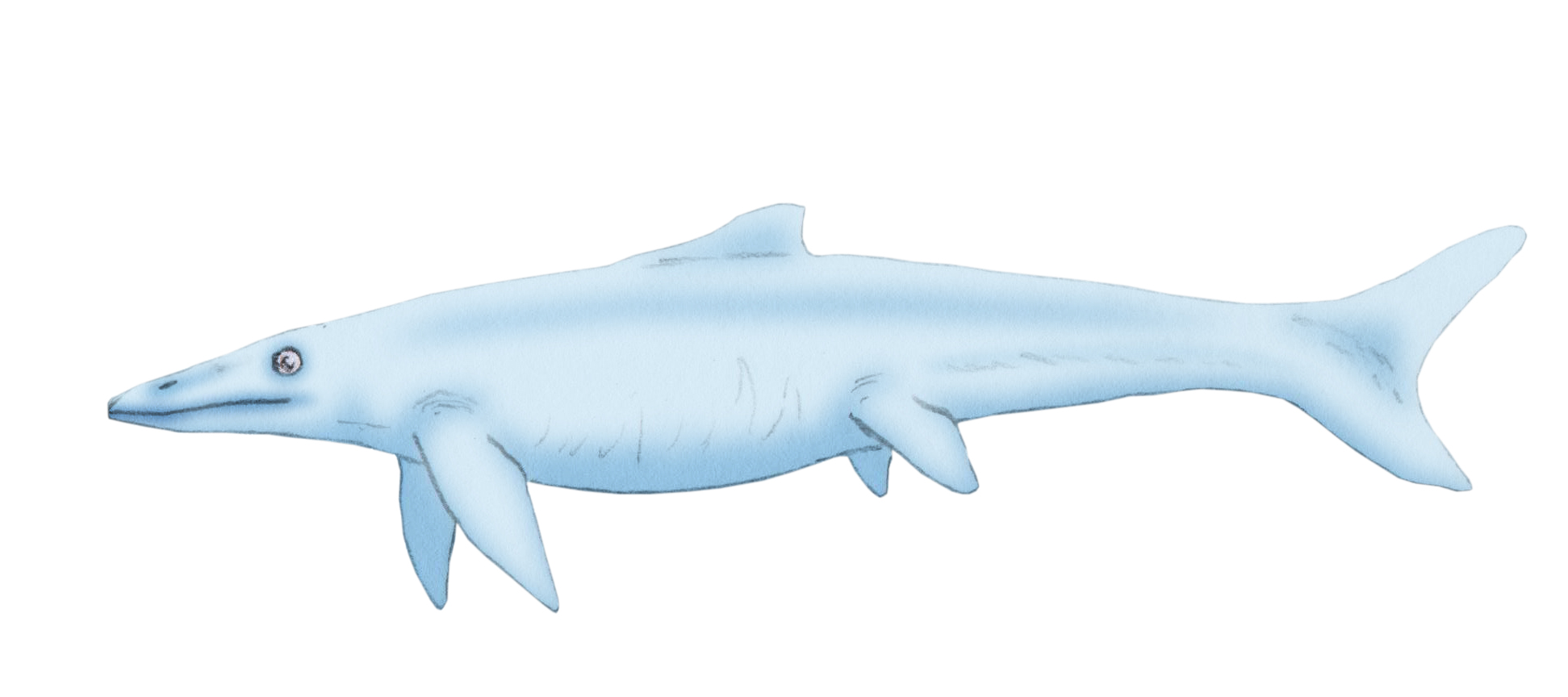 Restoration of Hudsonelpidia